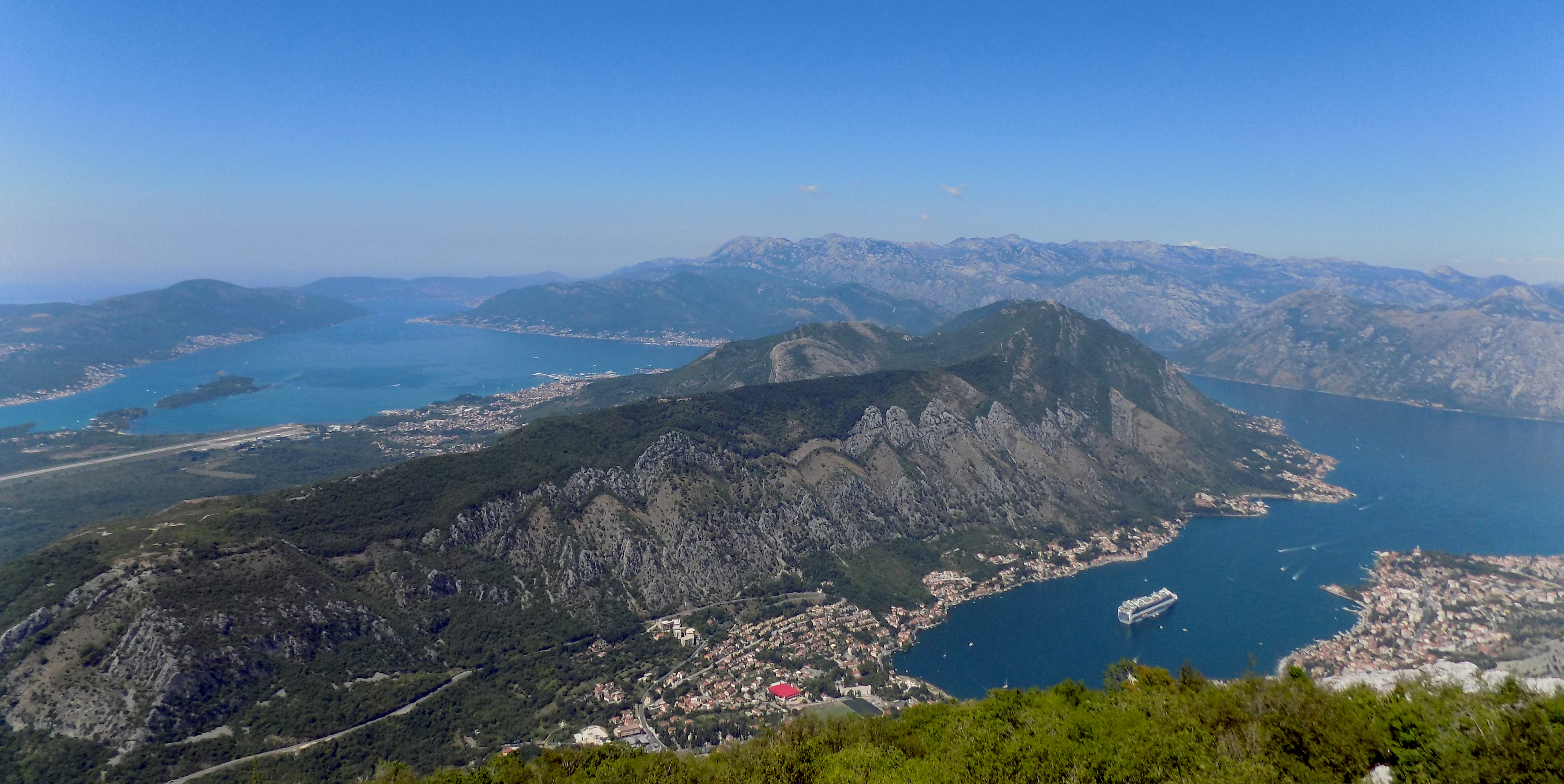 Srpski (latinica): Kruzer u Bokokotorskom zalivu